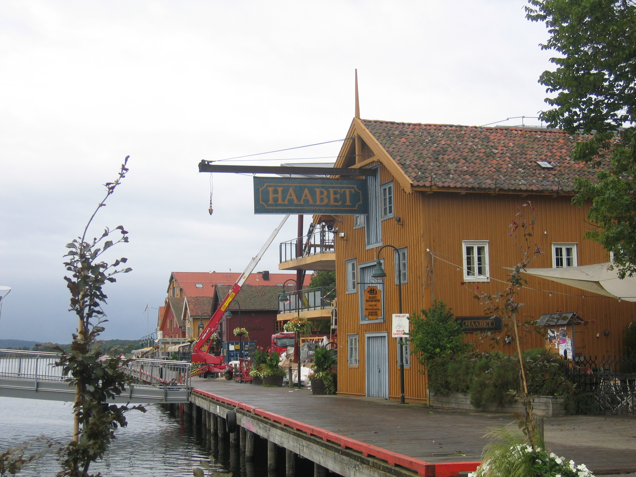 Tønsberg havn. Sjøbodkvartalet. Foynegårdens sjøbod. 2006.